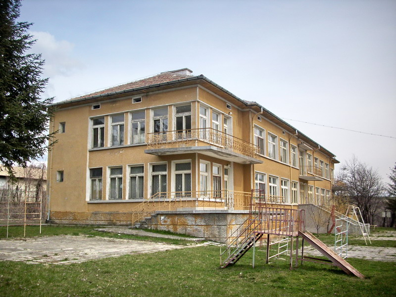 Село Ковачевец, община Попово. Детската градина на селото